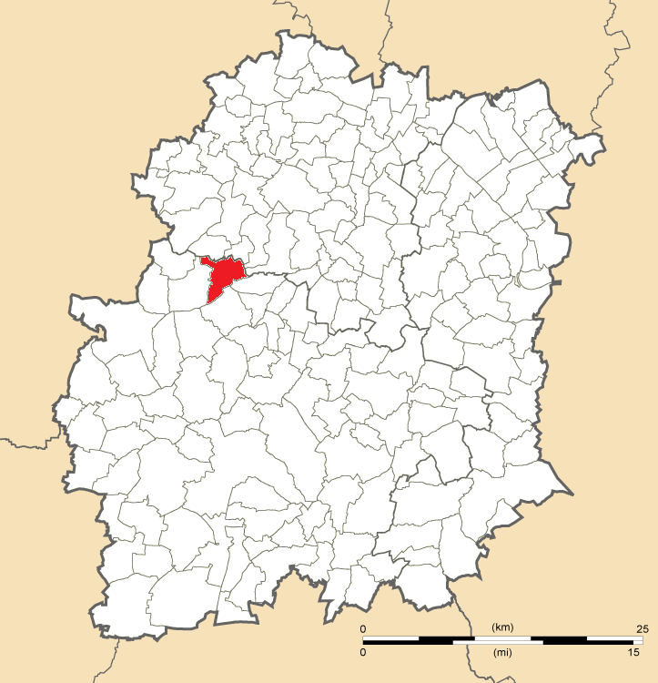 Carte de position de Saint-Maurice-Montcouronne en Essonne (91)